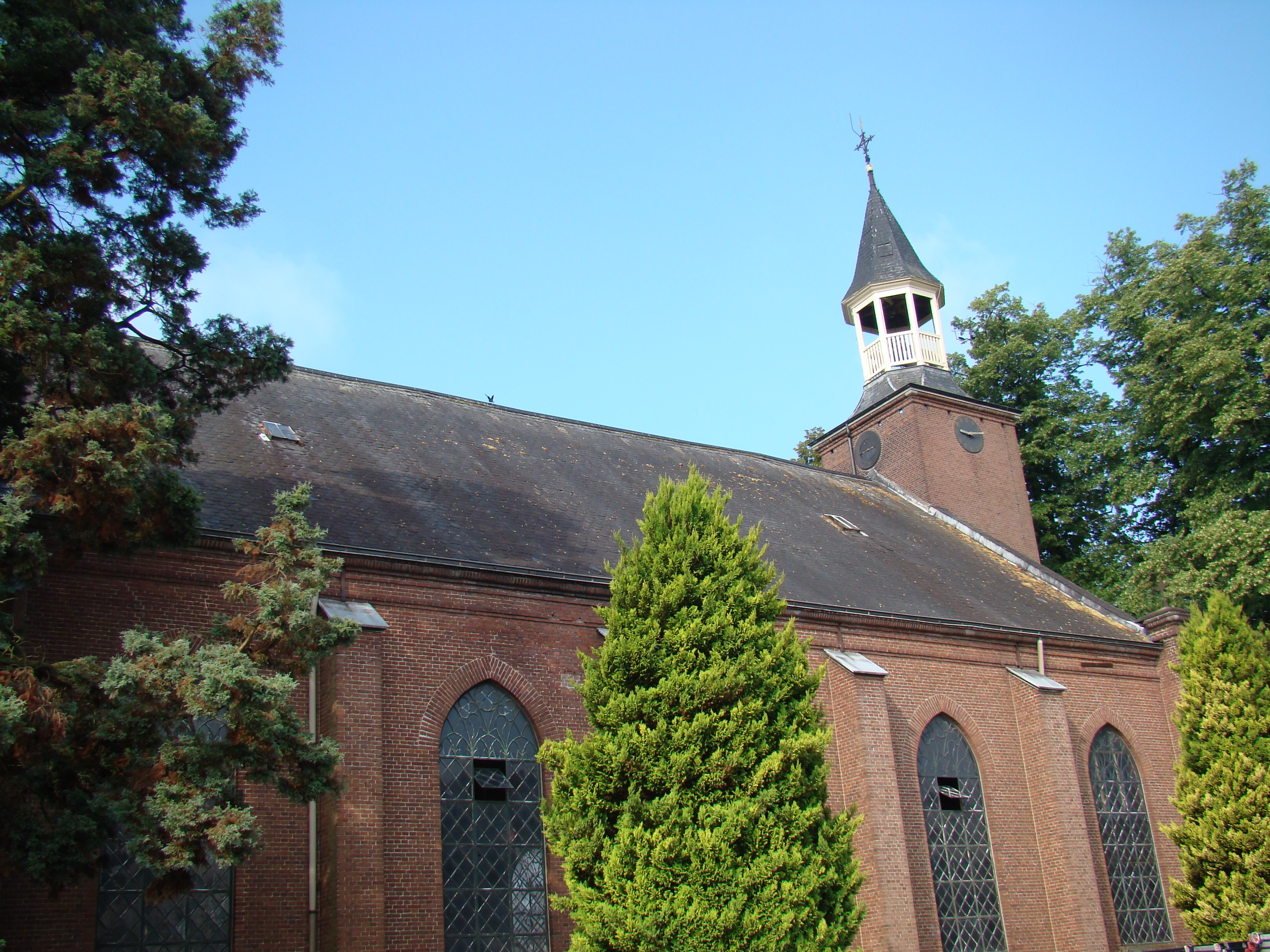 Church of Breedenbroek, Aalten, Netherlands